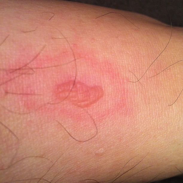 mordedura de araña de rincon